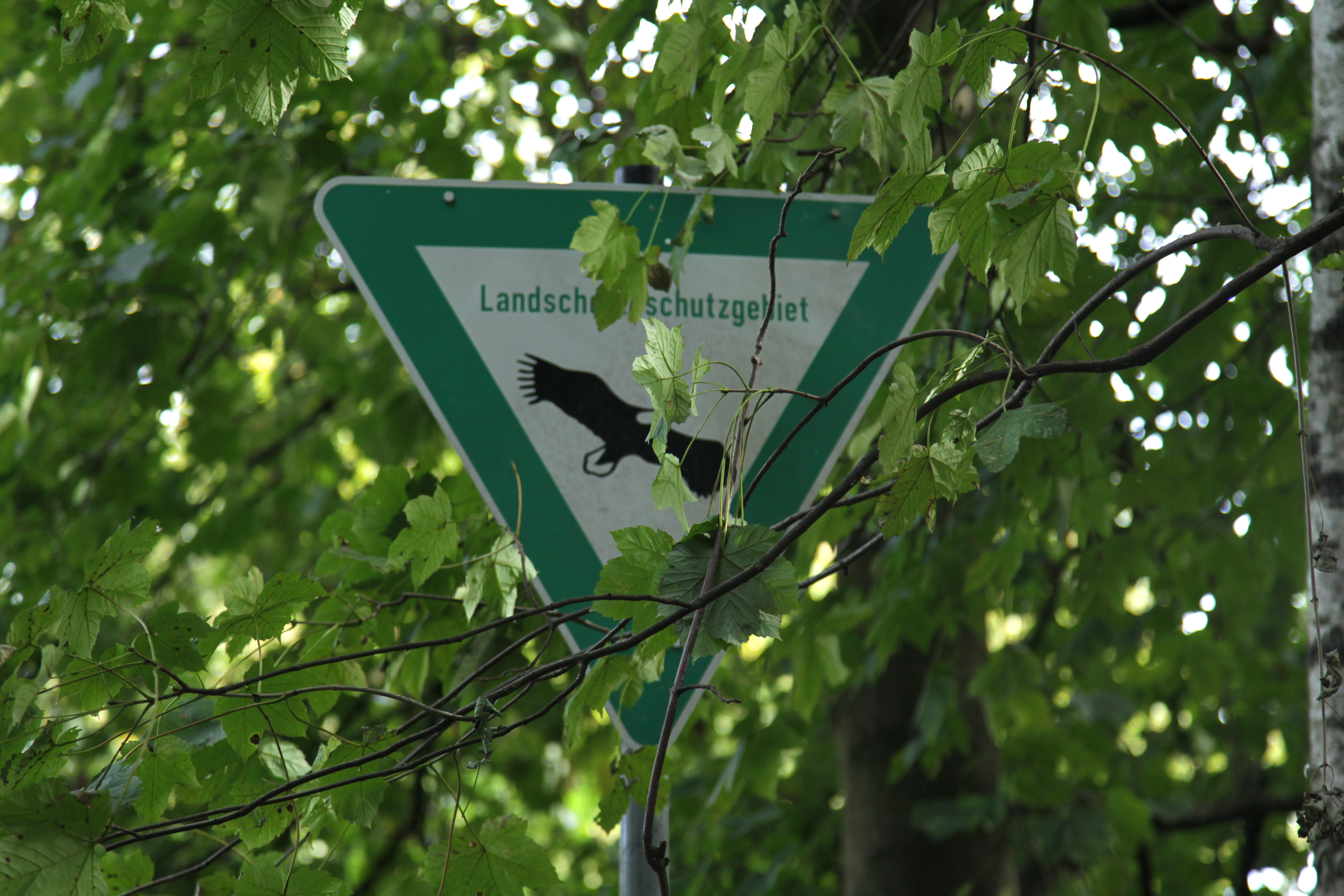 Halde Hannover, Hannoverstraße in Bochum, Schild zum Landschaftsschutzgebiet „Park Hordel, Dahlhausen, Hueller Bach, Hofsteder Bach und Marbach in Bochum-Mitte“